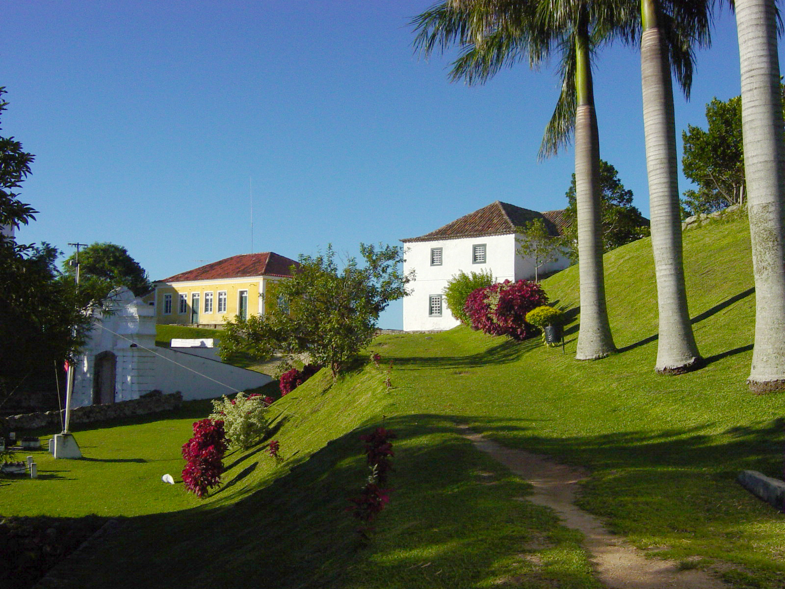 Fortaleza de Santa Cruz de Anhatomirim, Santa Catarina, Brasil: aspecto do portão de armas.